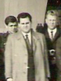 Detlev Neukirch, Helge Kildal (Mitte) und Ullrich Brümmer, Ausschnitt aus Mannschaft der Schachgemeinschaft Leipzig, die 1968 nach Nowosibirsk eingeladen wurde, zwei Mannschaftkämpfe in der Wissenschaftlerstadt Akademgorodok, einem Stadtteil von Novosibirsk, austrugen und die Stadt besichtigen durften.